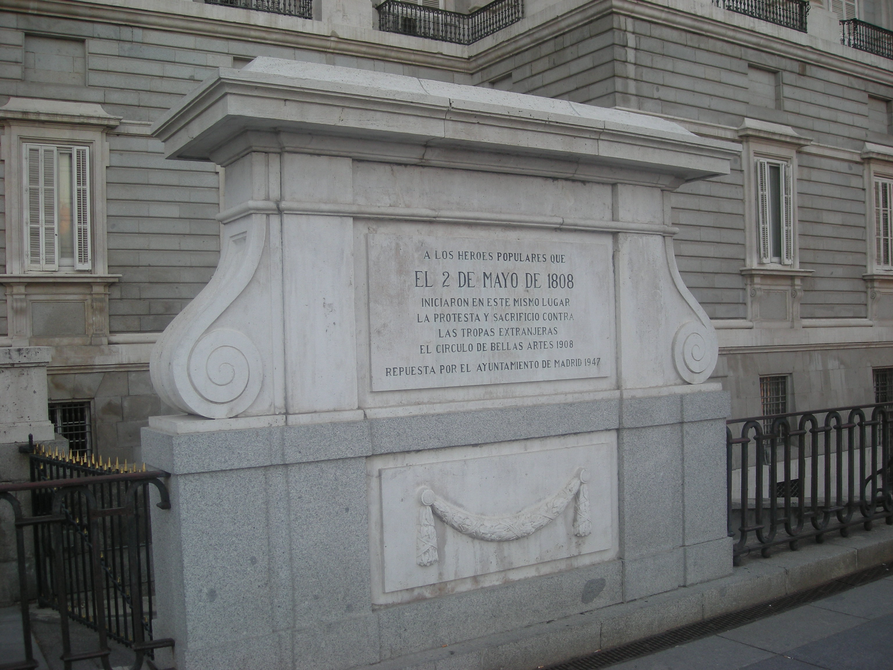 Homenaje al 2 de Mayo, Plaza de Oriente (Madrid)